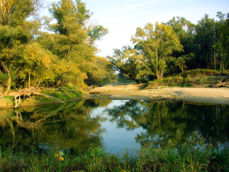 Altarm der Donau-Auen bei Schönau. Landschaft im Nationalpark Donau-Auen bei Niedrigwasser im Herbst. Bei höherem Wasserstand ist der in den Hintergrund verlaufende Arm geflutet, seit versucht wird, die Altarme wieder direkt mit der Donau zu verbinden.